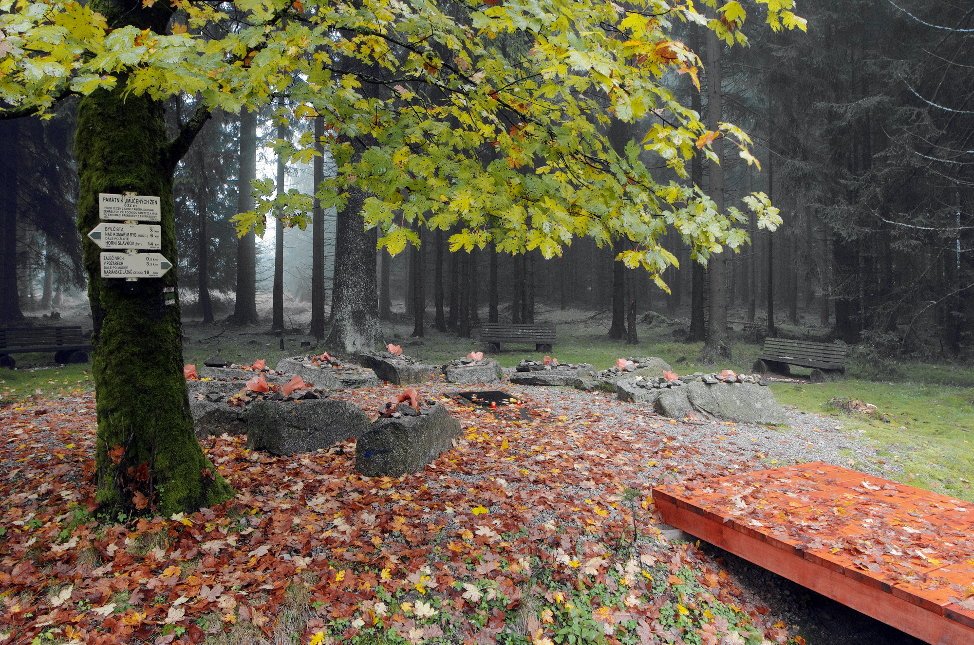 Památník umučených žen u zaniklé obce Čisté ve Slavkovském lese, okres Sokolov